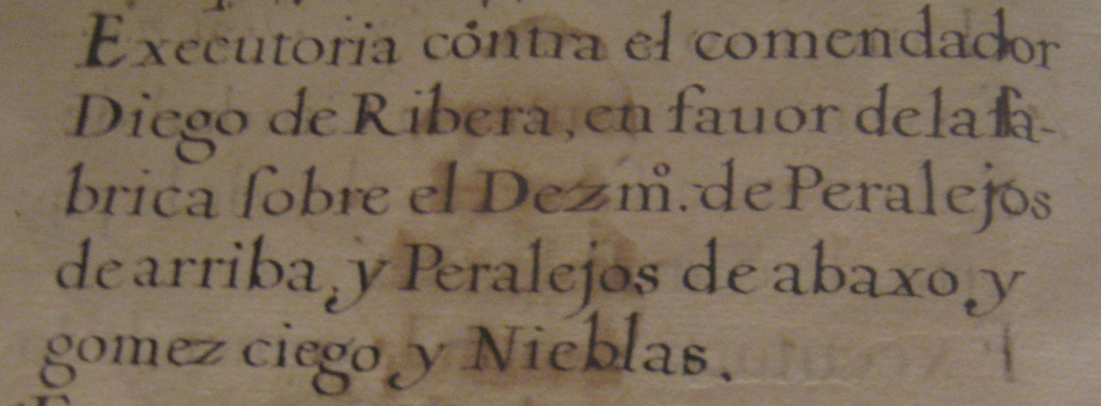 Fragmento del Inventario del Archivo del Cabildo Catedralicio de Salamanca de 1616, en que se cita a Peralejos de Arriba, Peralejos de Abajo y Gomeciego